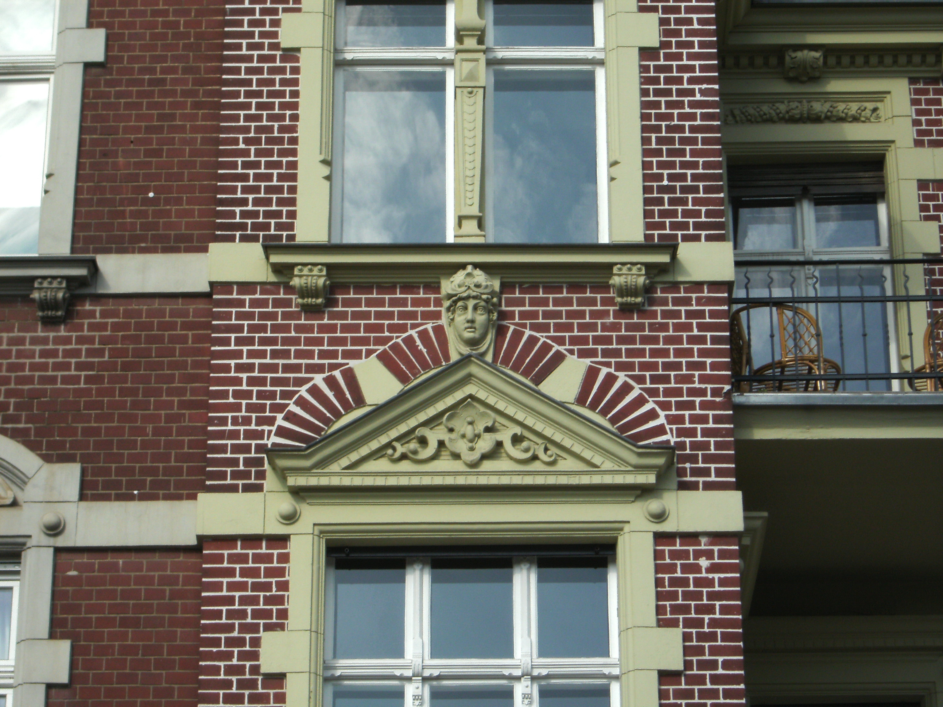 Schillerstraße 52,2